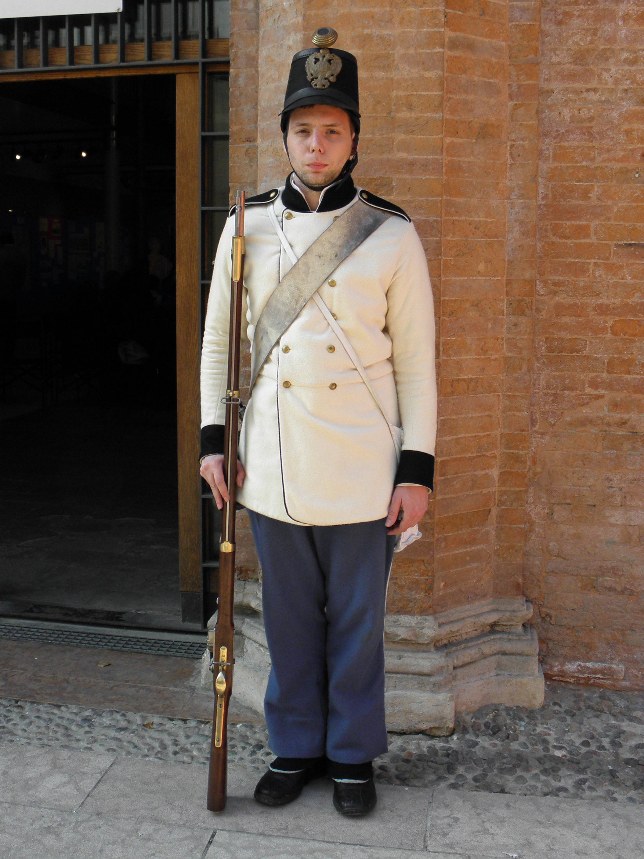 Figurante dell'Associazione Napoleonica d'Italia in uniforme dell'esercito imperiale austriaco: soldato semplice. La foto è stata scattata all'esterno della palazzina della Pescheria nuova a Rovigo.